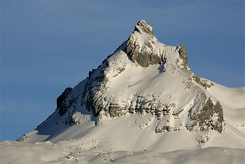 Melchsee-Frutt: Graustock